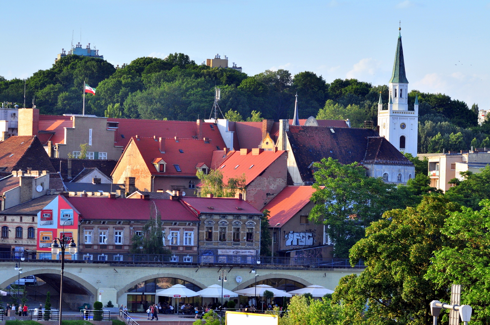 Gorzów Wielkopolski, zabudowa śródmiejska - widok od strony Warty.